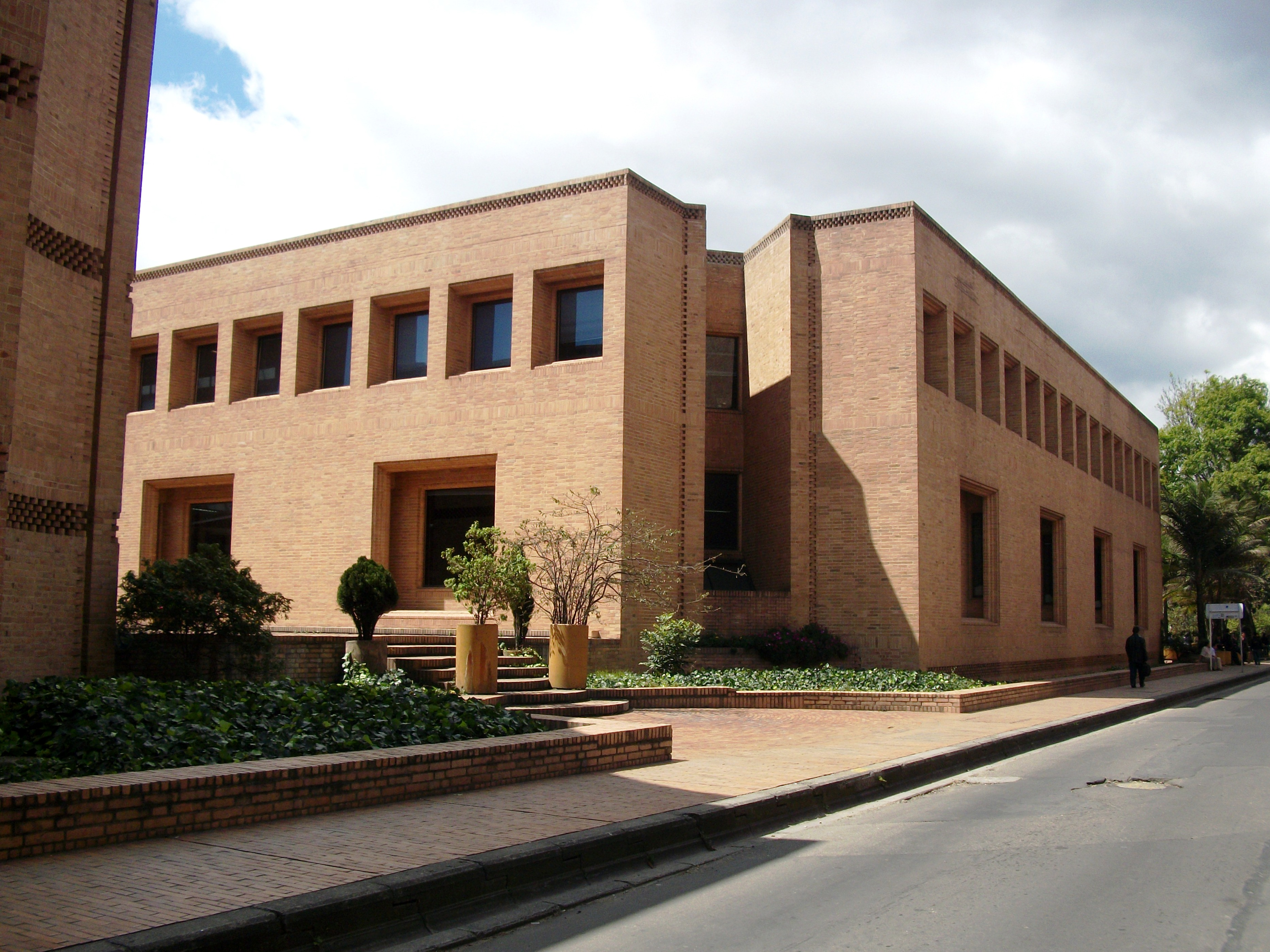 Archivo General de la Nación, carrera 6 calle 5. Bogotá (Colombia).